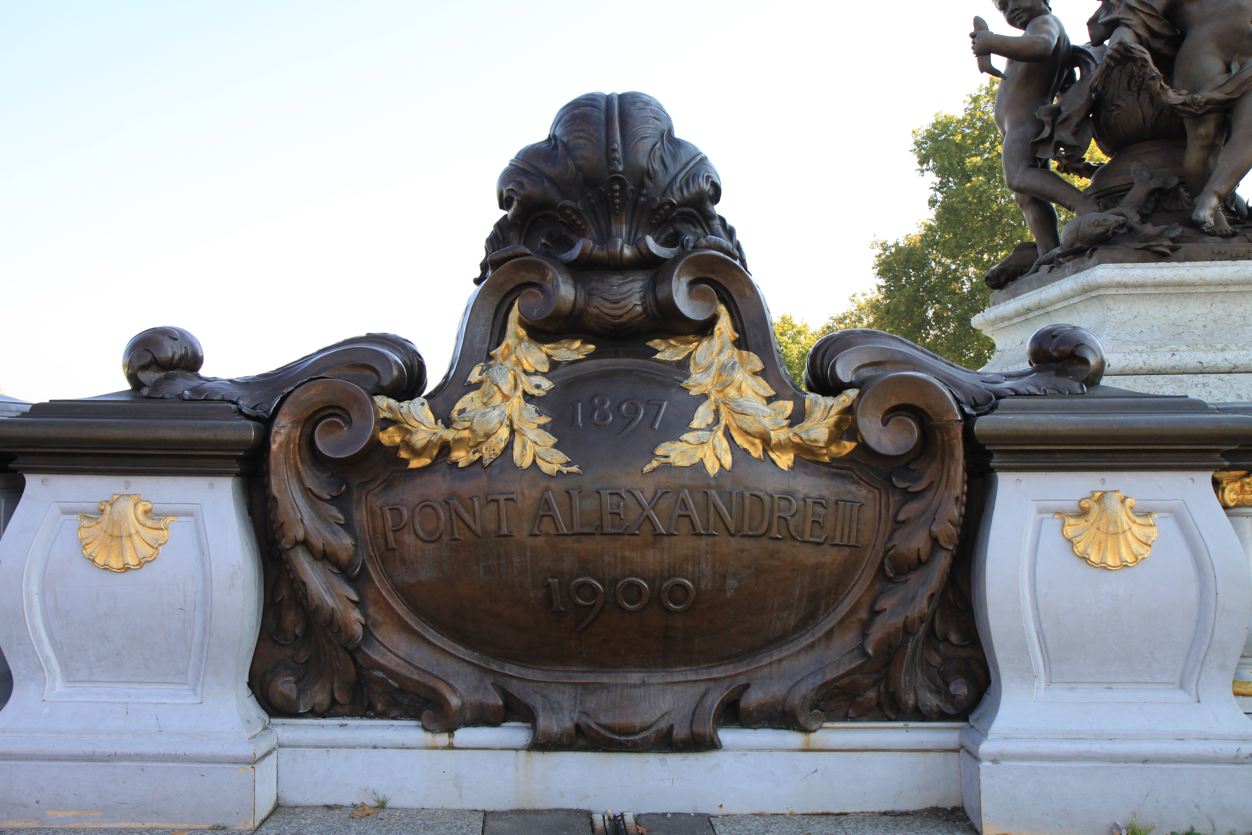 Cartouche, cuivre repoussé, garde-corps du Pont Alexandre-III, Paris, France